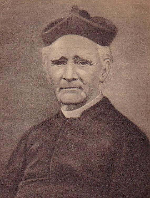 Petrus Joseph Savelberg (1827-1907). Nederlands priester